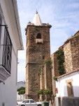 Casillas de Coria. (c)Antonio Cordero Categoría:España (imagen)